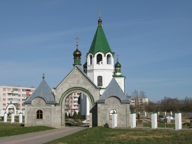 Фаніпаль. Царква